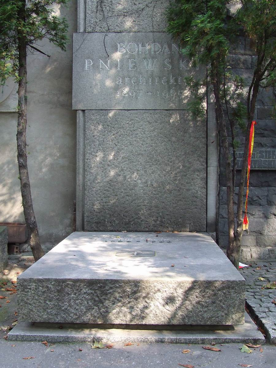 Bohdan Pniewski, grób, Stare Powązki